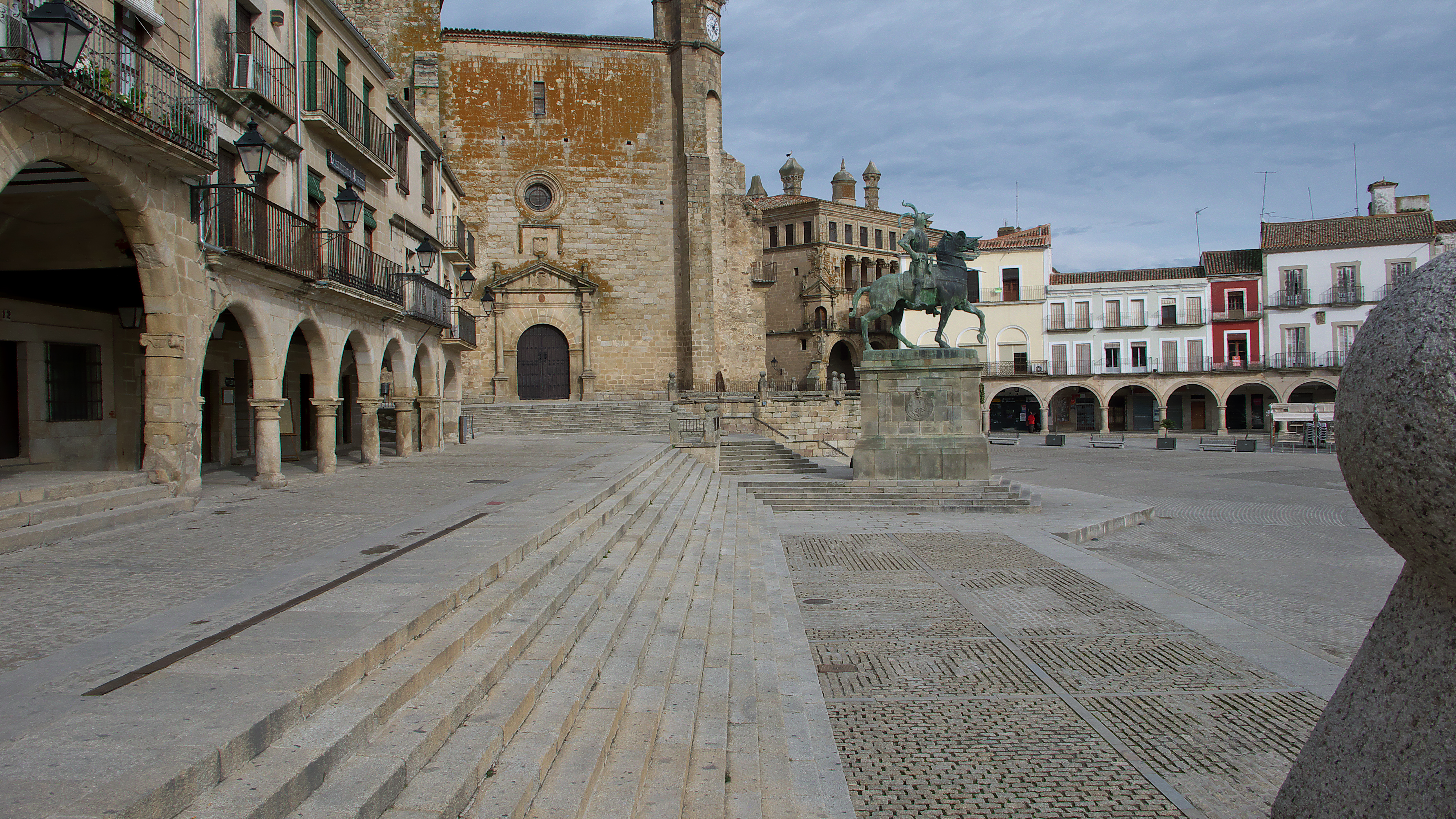 Portal alto de la Plaza, estatua ecuestre de Francisco Pizarro, iglesia de San Martín, palacio Ducal de San Carlos.